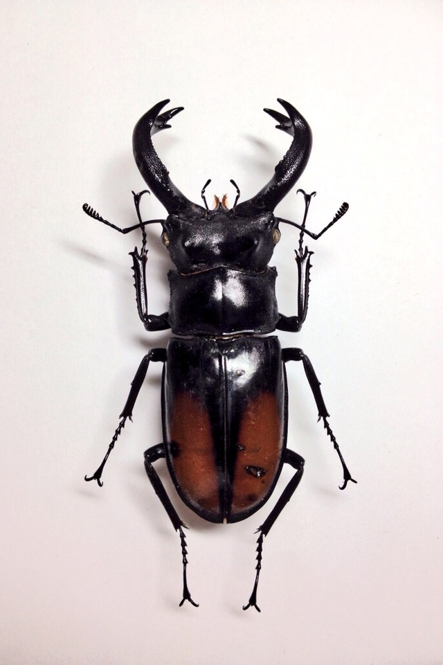 セアカフタマタクワガタ